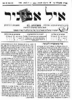 Главата на вестник "Авенир".